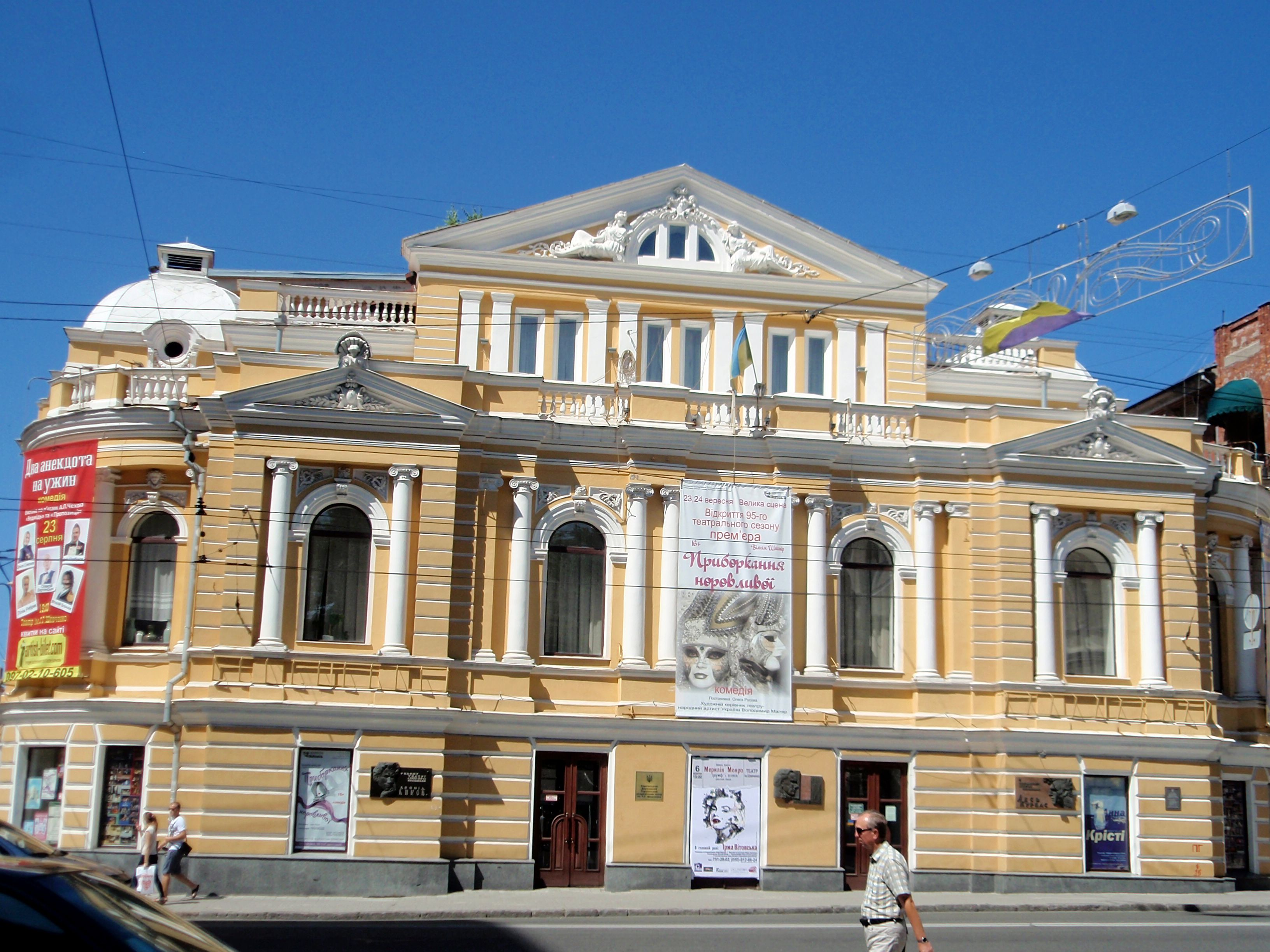 Харківський академічний український драматичний театр — будинок, у якому працював театр «Березіль» під керівництвом Леся Курбаса, Харків, вул. Сумська, 9